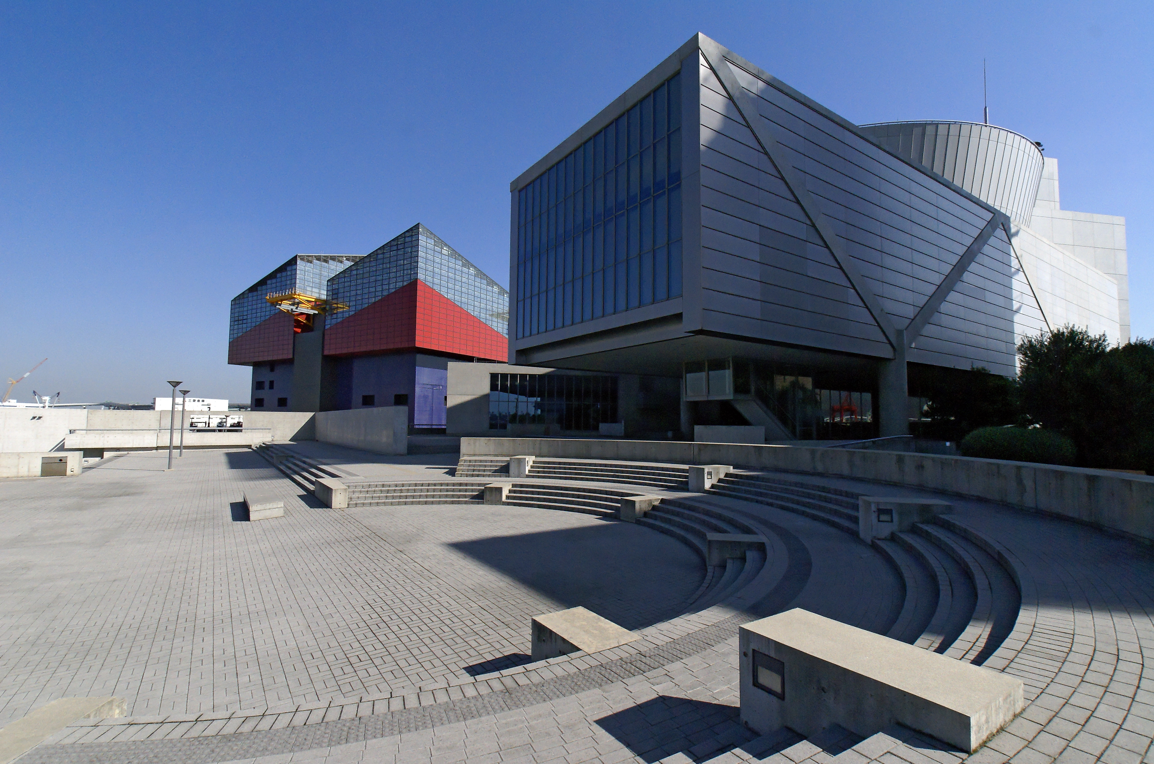 Suntory Museum in Osaka, Osaka prefecture, Japan